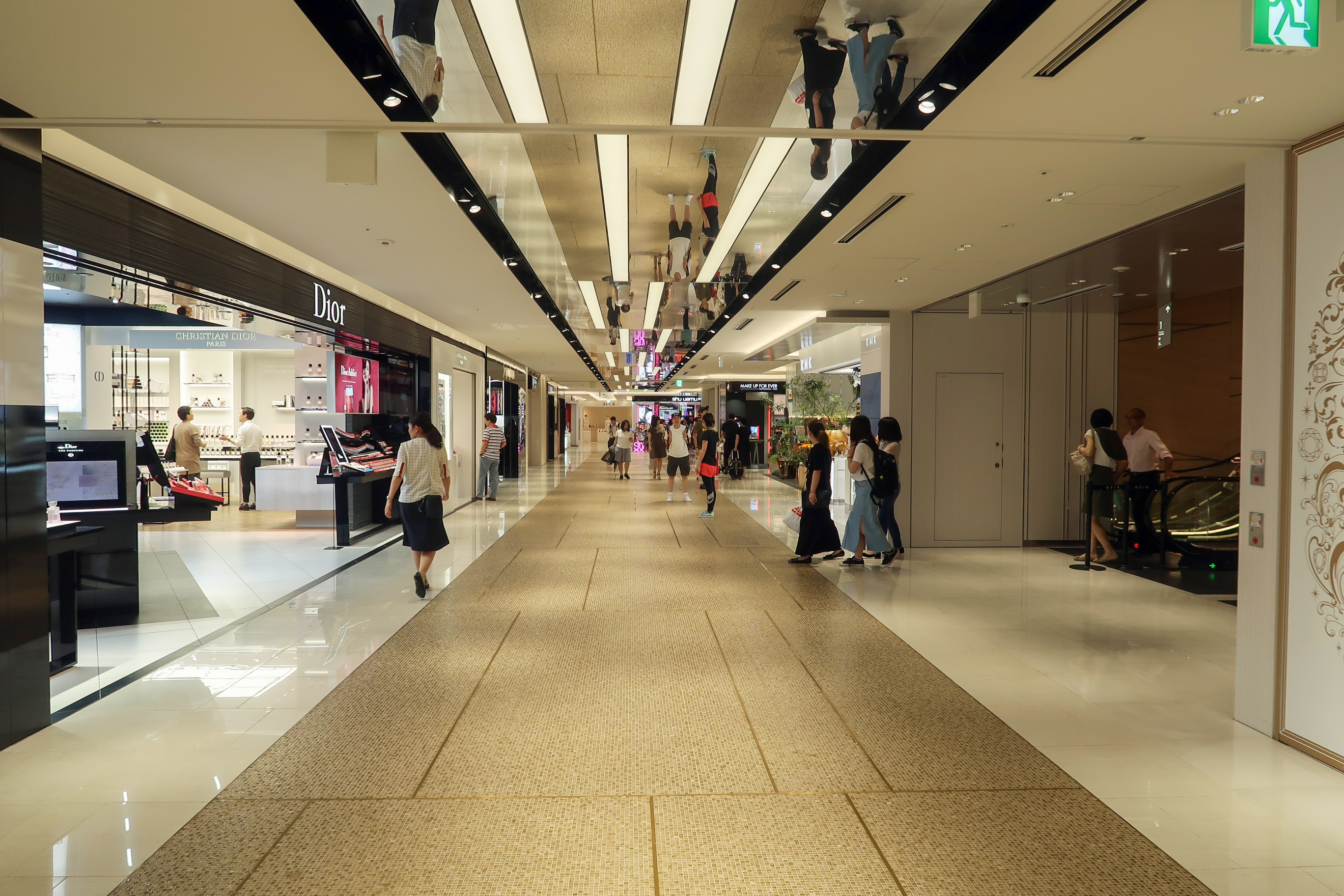 GINZA SIX B1